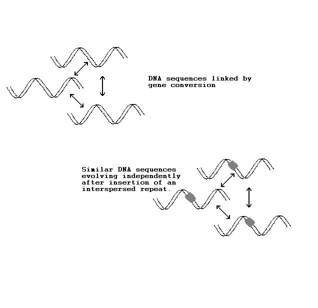 وصف : رسم يُظهر نموذجاً لبرك المورثات. * مصدر : [1]. * تاريخ : 25 كانون الثاني 2010. * منتج : أنشأه ""crunkcar. * إذن : انظر أدناه. * نسخ_أخرى